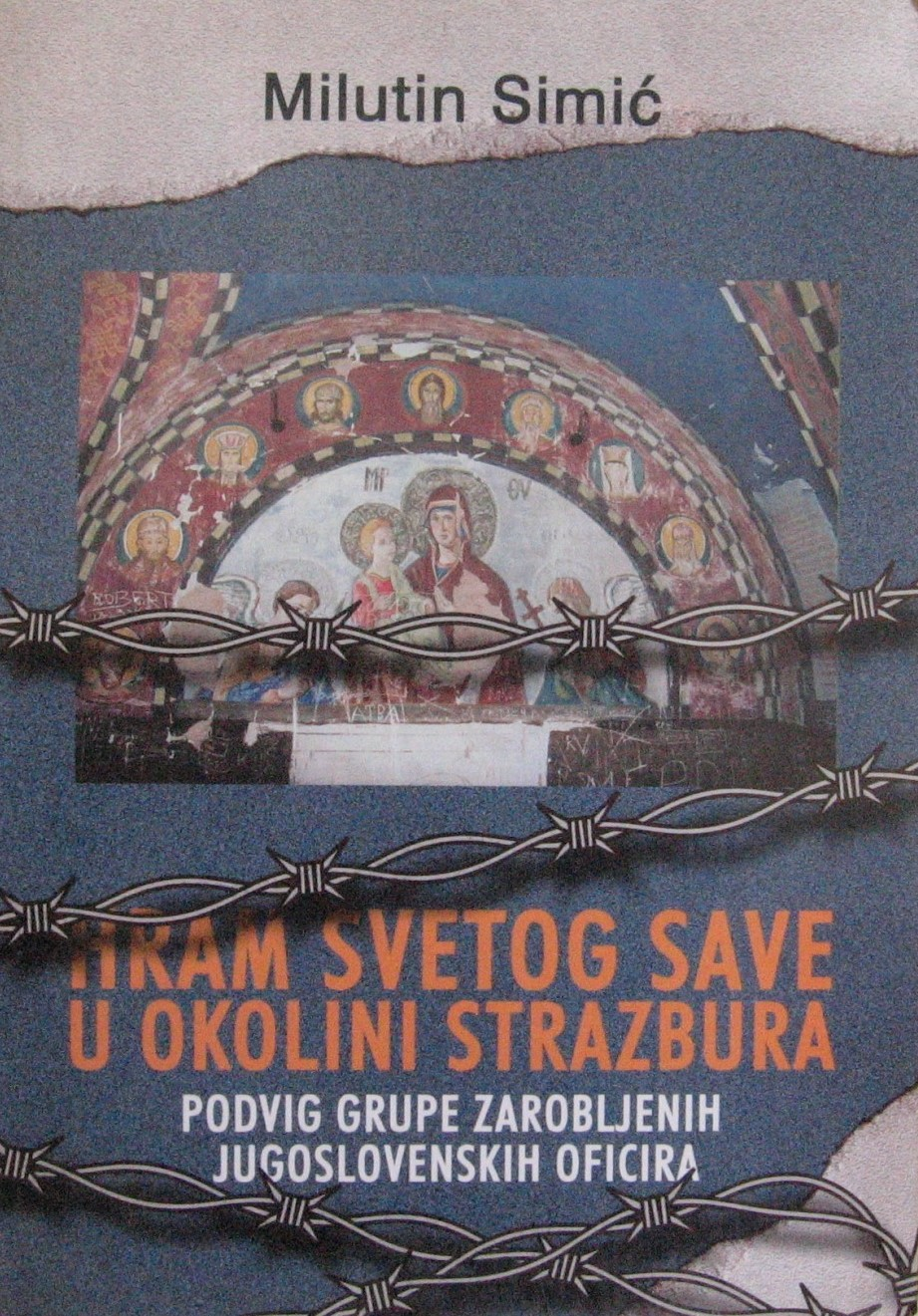 Српски (ћирилица): Корица књиге Милутина Симића "Храм Светог Саве у околини Стразбурга".